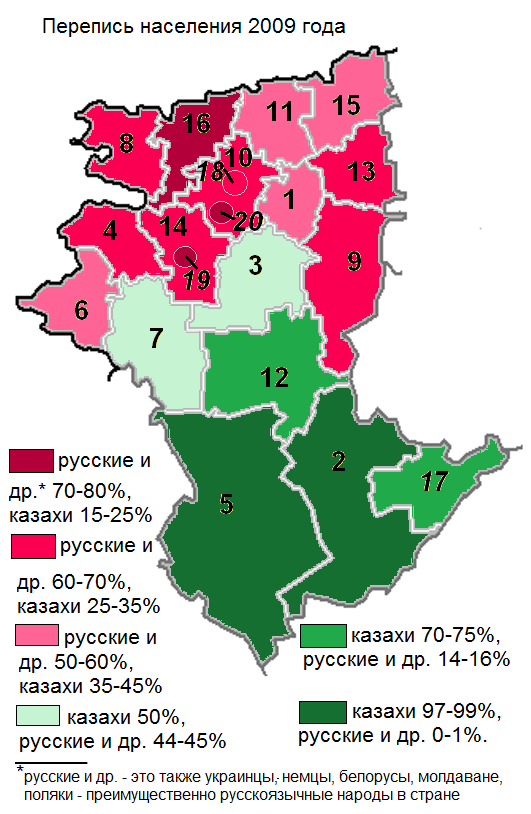 Доля казахов, русских и др. по районам Костанайской области по переписи населения 2009 года